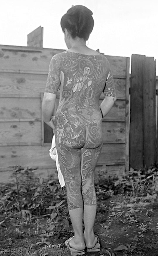 Mujer tatuada estilo Horimono. Horace Bristol (1946).